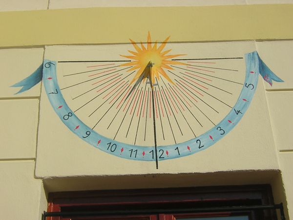 Κατακόρυφο ηλιακό ρολόι στο 1 ΓΕΛ Δράμας